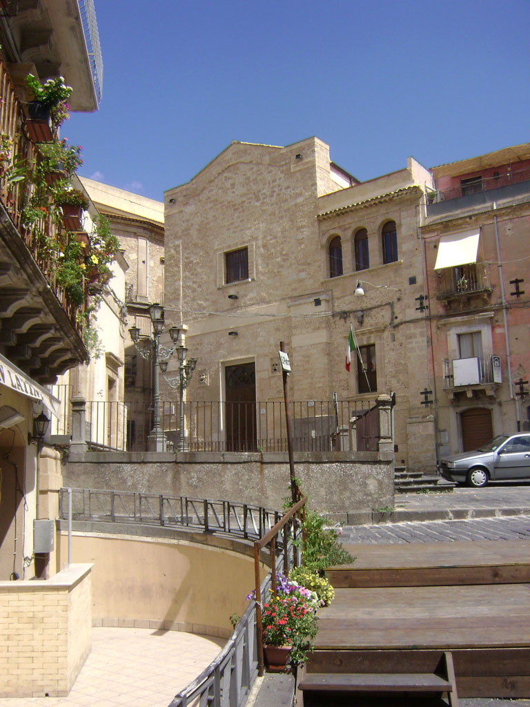 Auditorium Comunale Ialuna